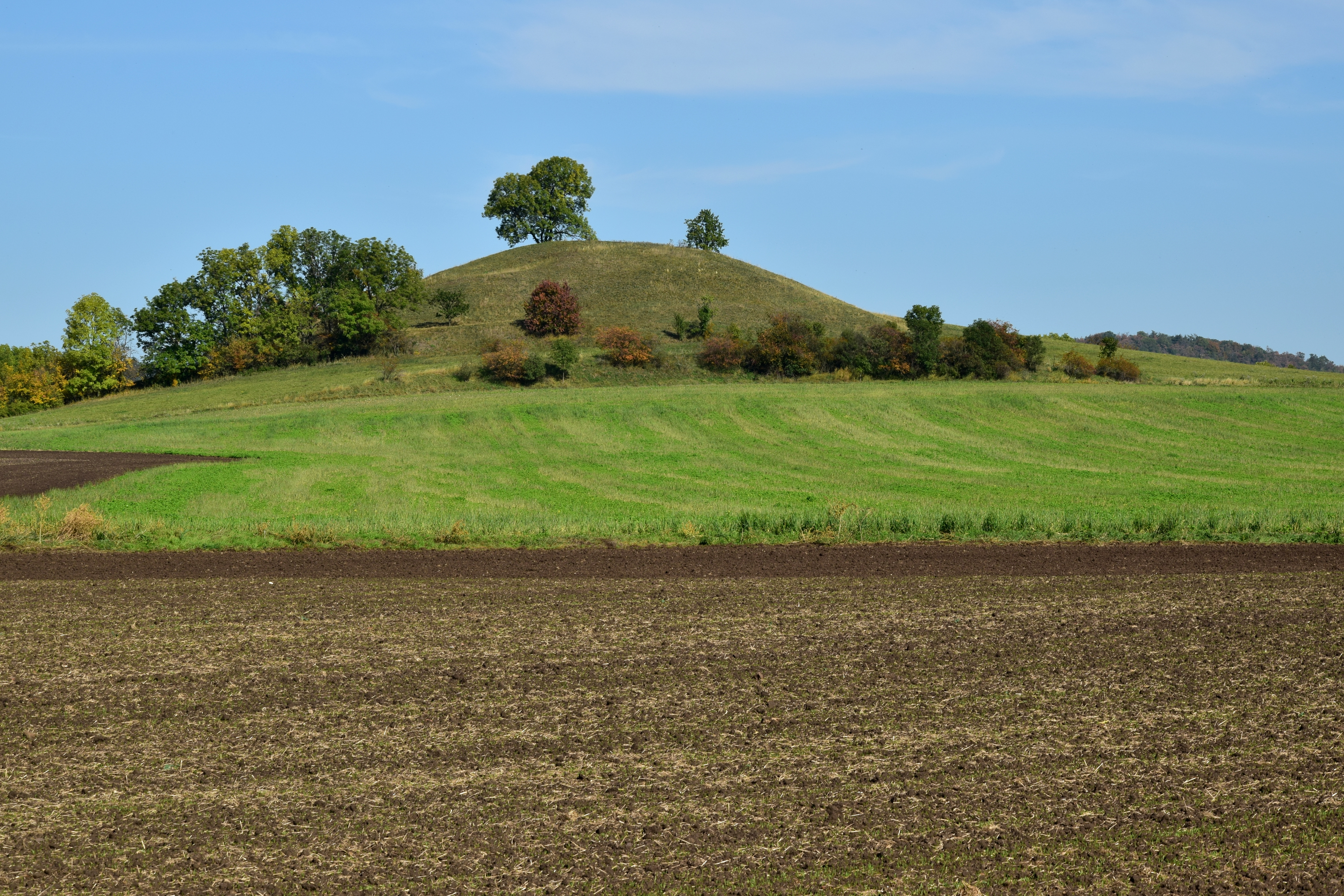 Kozly – Tobiášův vrch ze silnice Kozly–Bělušice